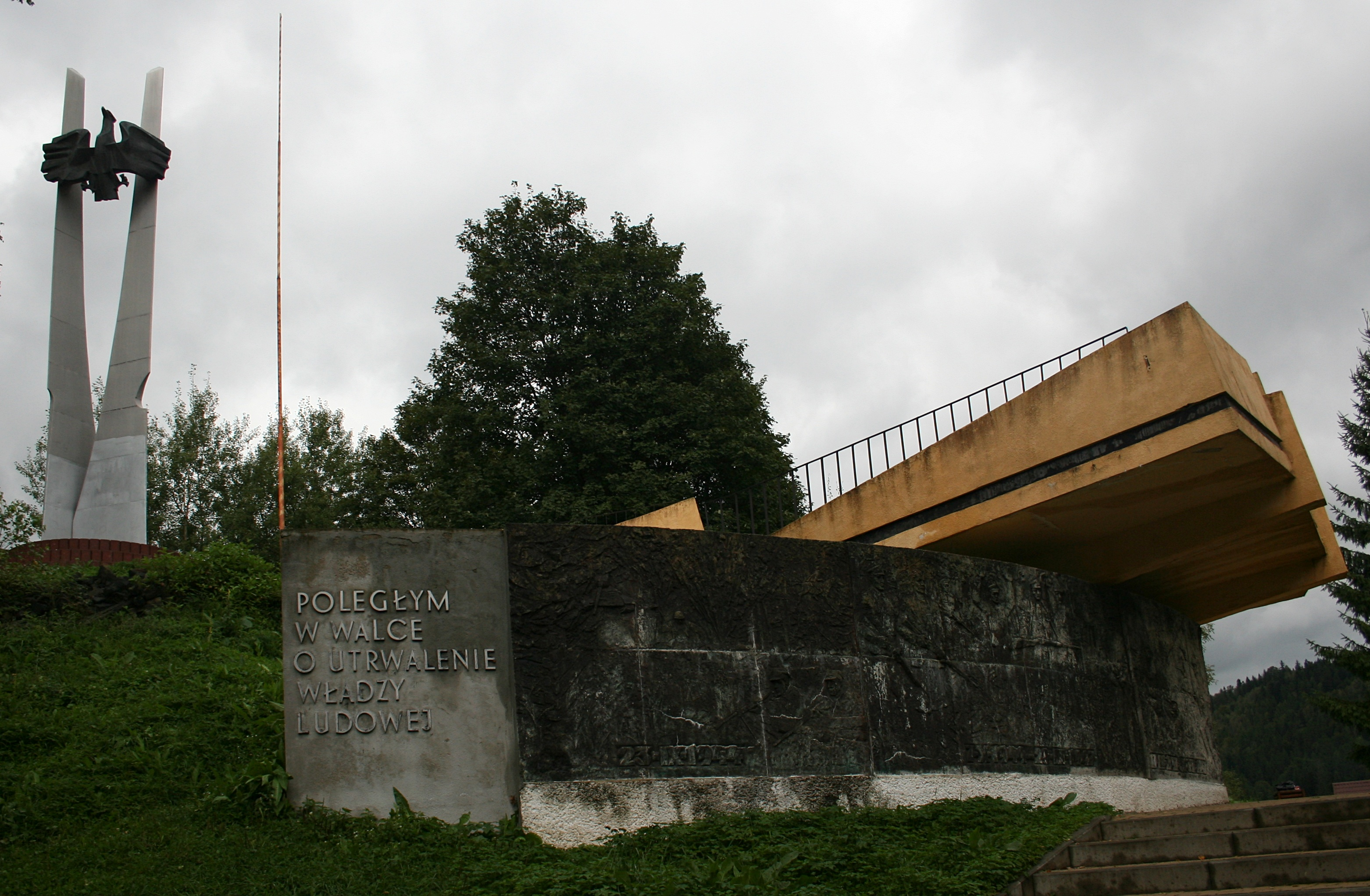 Pomnik "poległym w walce o utrwalanie władzy ludowej" w Cisnej, woj. podkarpackie